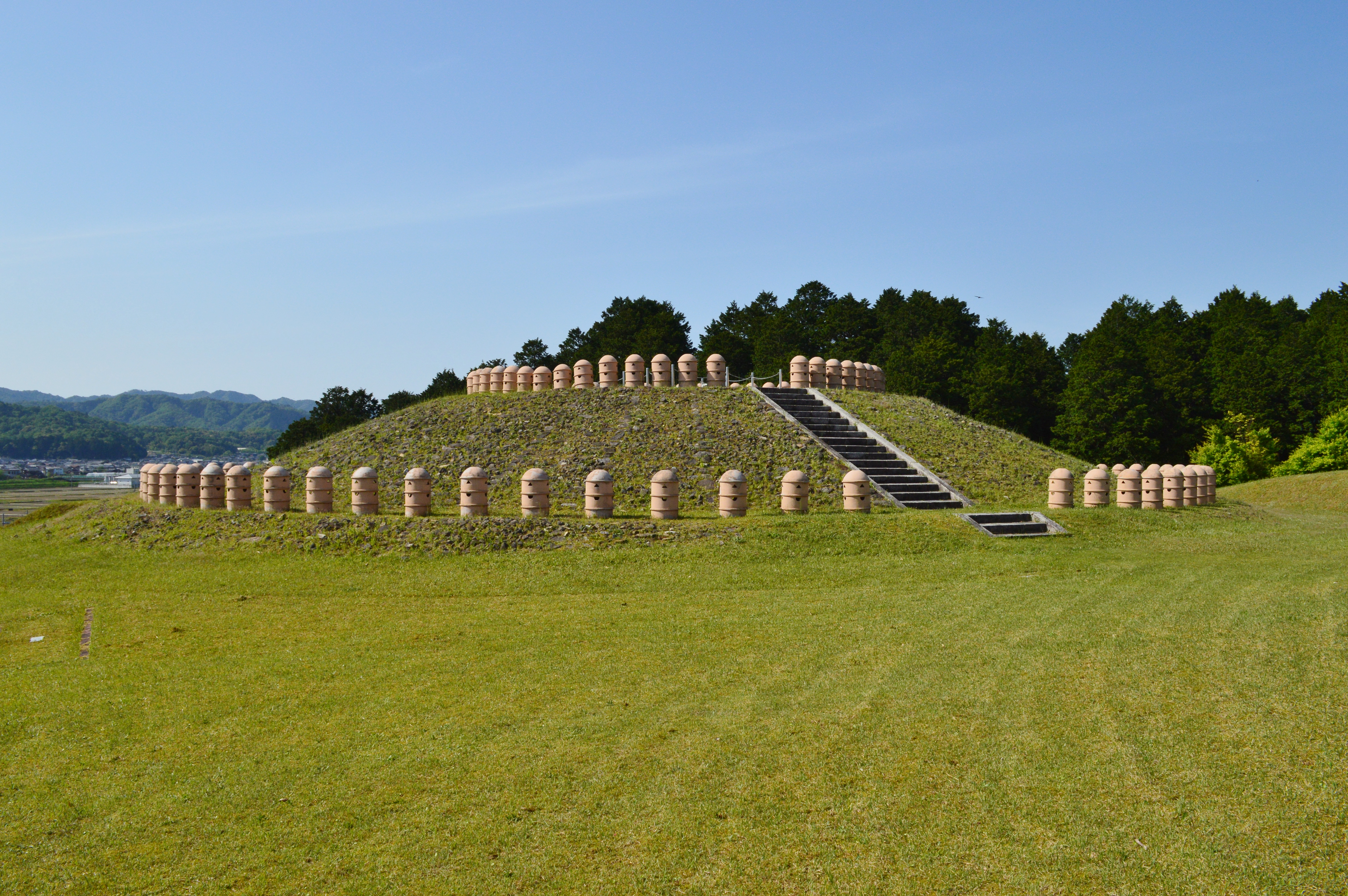 作山1号墳 墳丘全景